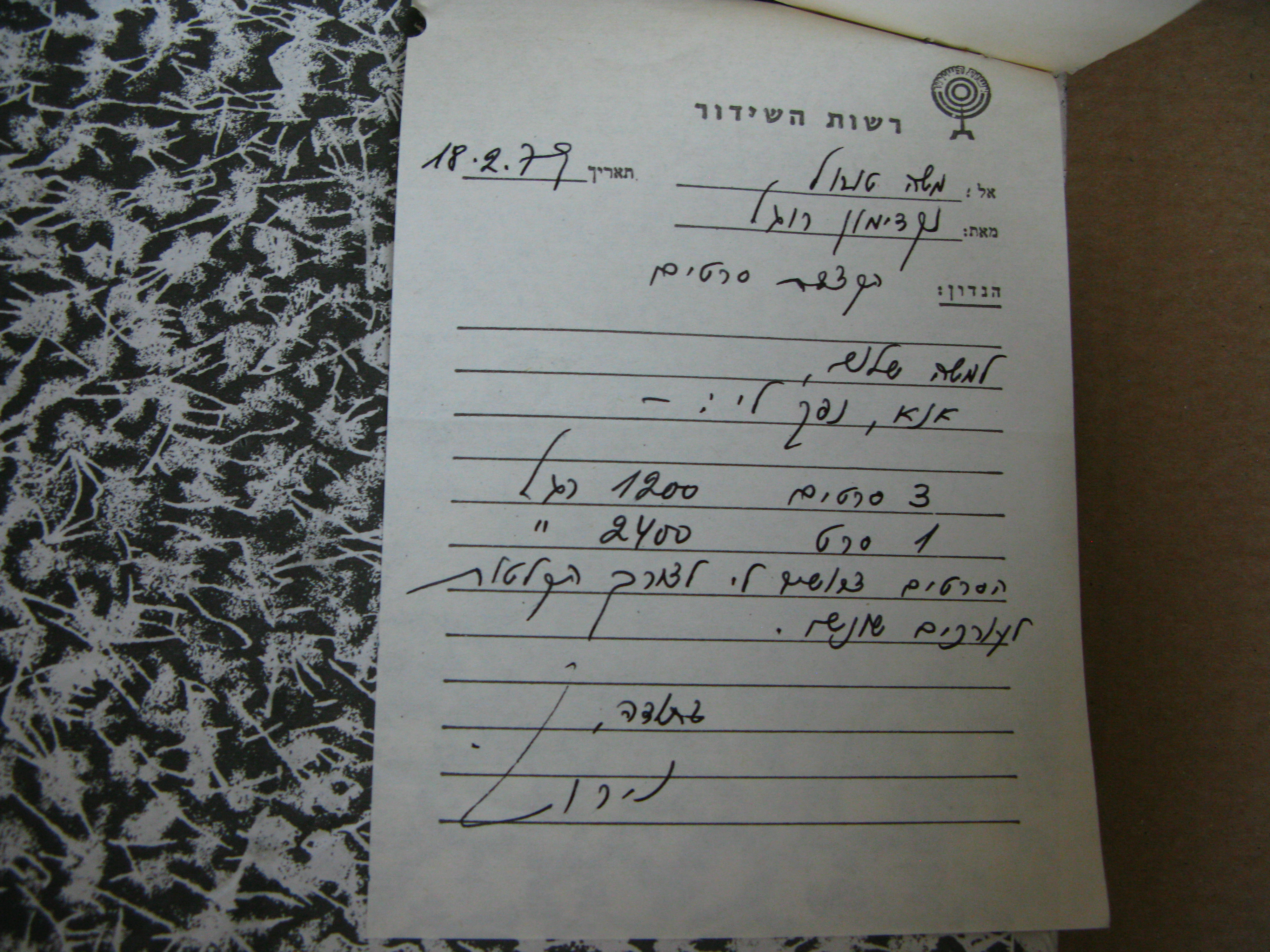 בניין קול ישראל ברחוב הלני המלכה בירושלים, משמש את תחנת הרדיו "קול ישראל" מאז ימי הרדיו המנדטורי ב-1939, ולסגירת רשות השידור.